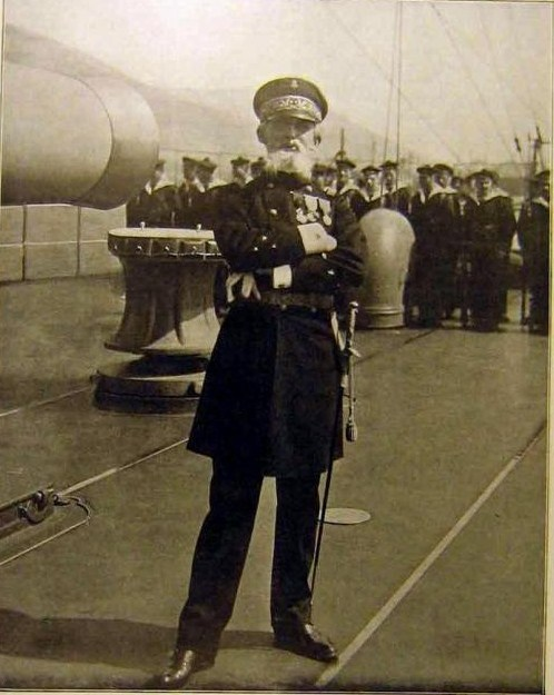 L'amiral Guépratte pendant son passage en méditerrané.